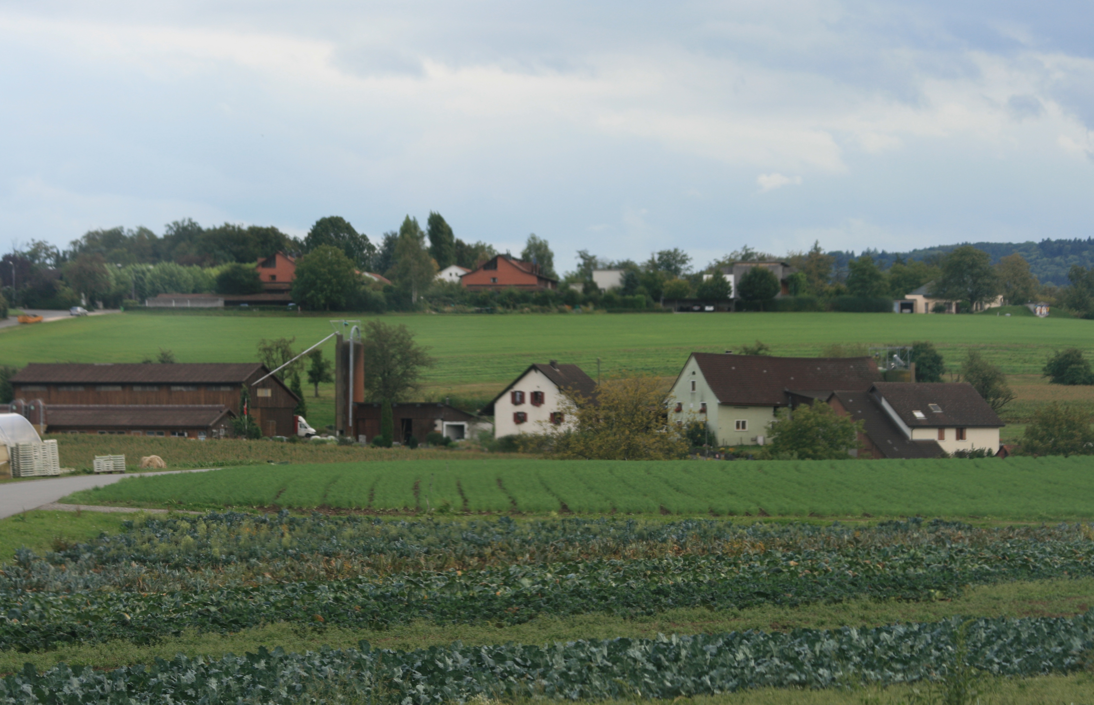 Muntwil